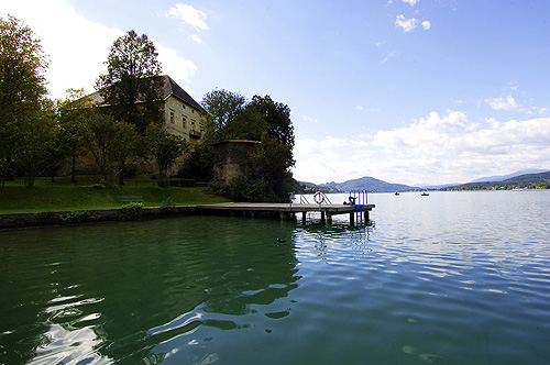 Schloss Maria-Loretto am Wörthersee, Ansicht vom Osten.